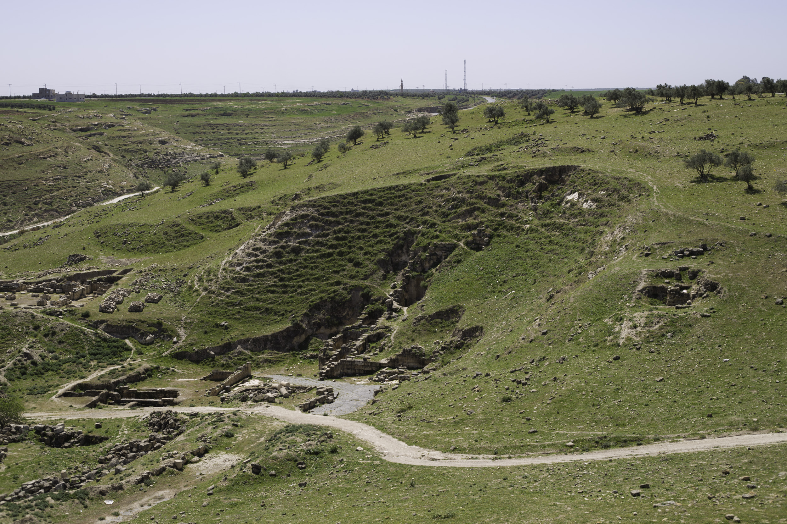 Tell Abila